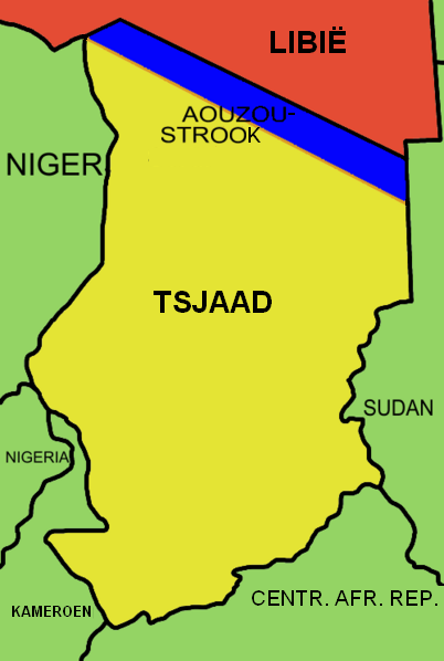 Van de Engelstalige Wikipedia (Map_of_Aouzou_stip_Chad.PNG) (nl::commons:User:Roke)